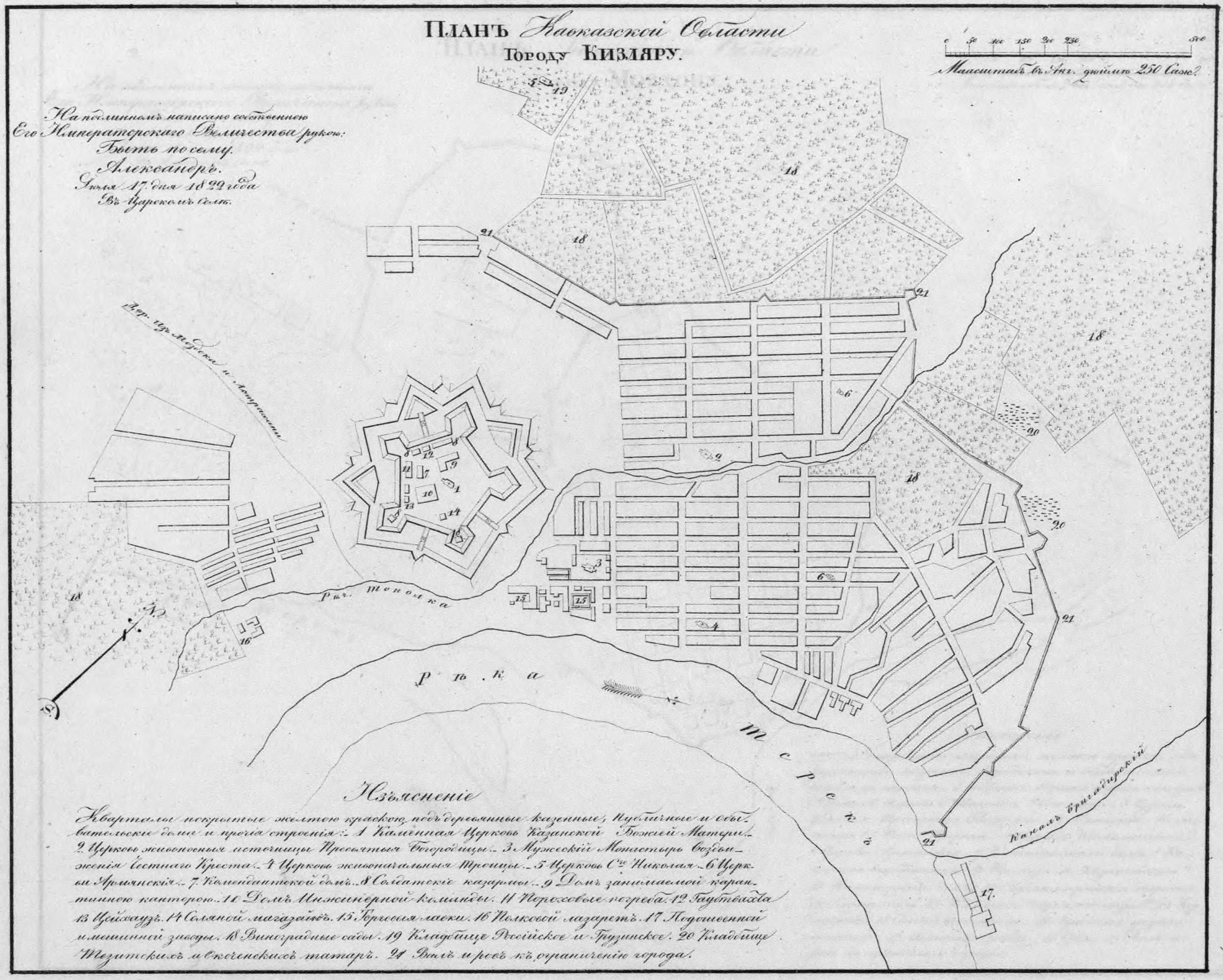 Полное Собрание Законов Российской Империи. Собрание первое. Книга чертежей и рисунков. (Планы городов).; 1839, Санктпетербургъ, Въ Типографіи II Отделенія Собственной Е. И. В. Канцеляріи.